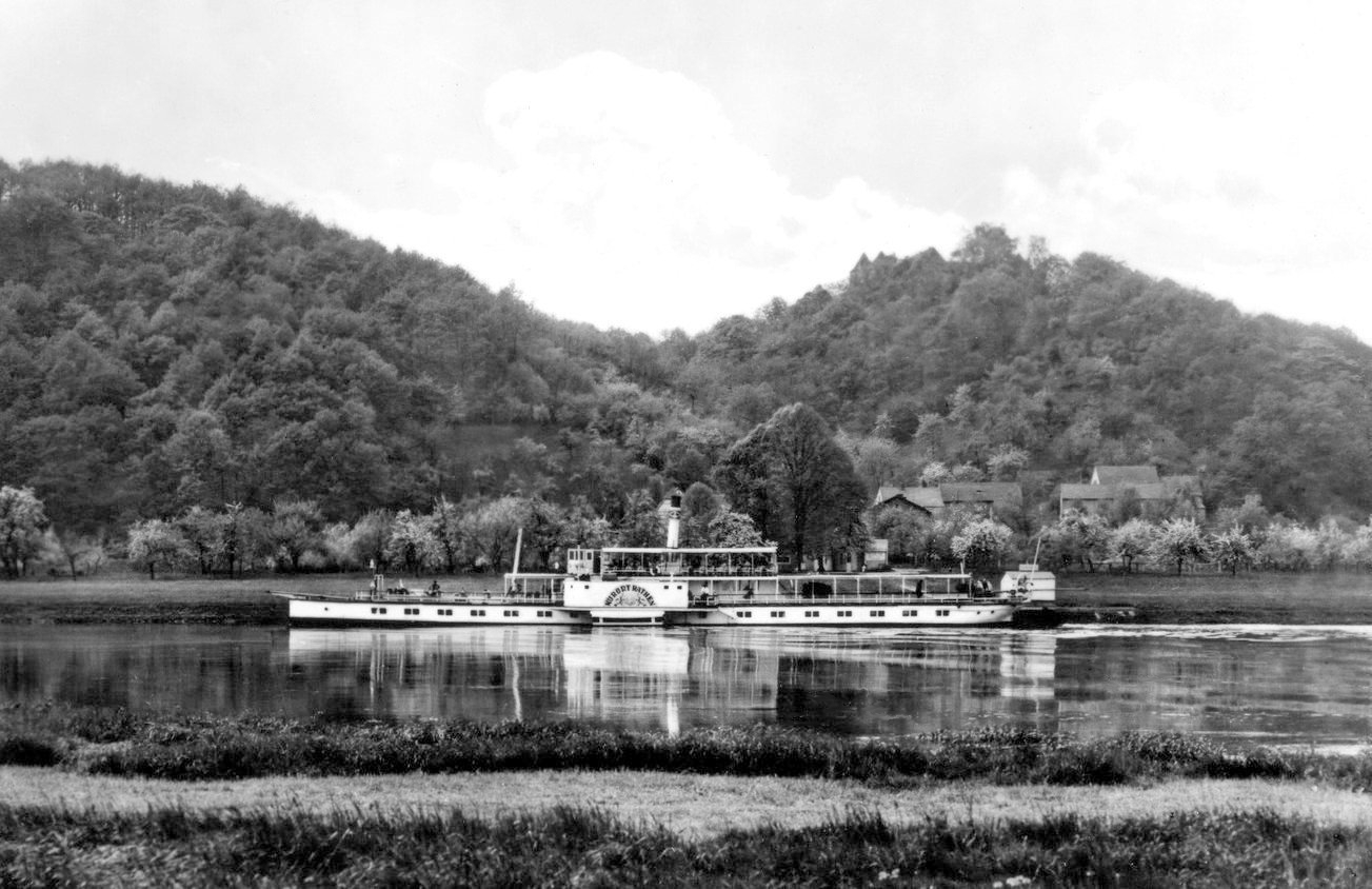 Scharfenberg; Elbgasthof mit Dampfer Kurort Rathen This postcard is from publisher Brück & Sohn in Meißen ( postcard has a unique number 29814 and is available in a higher resolution at the publisher. This images was uploaded in a cooperation project between Wikipedians and the publisher.